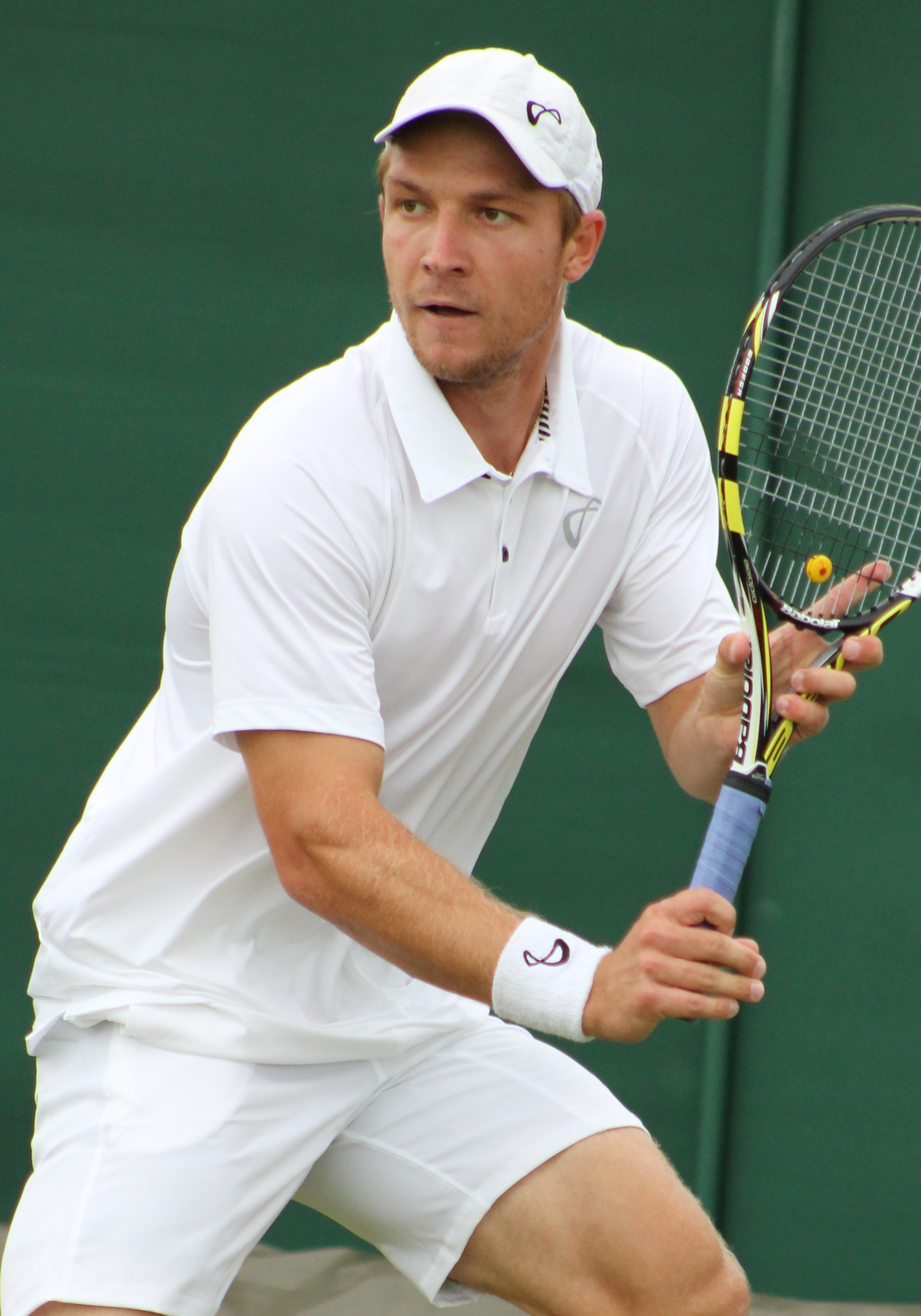 Kosakowski WMQ14 (6)